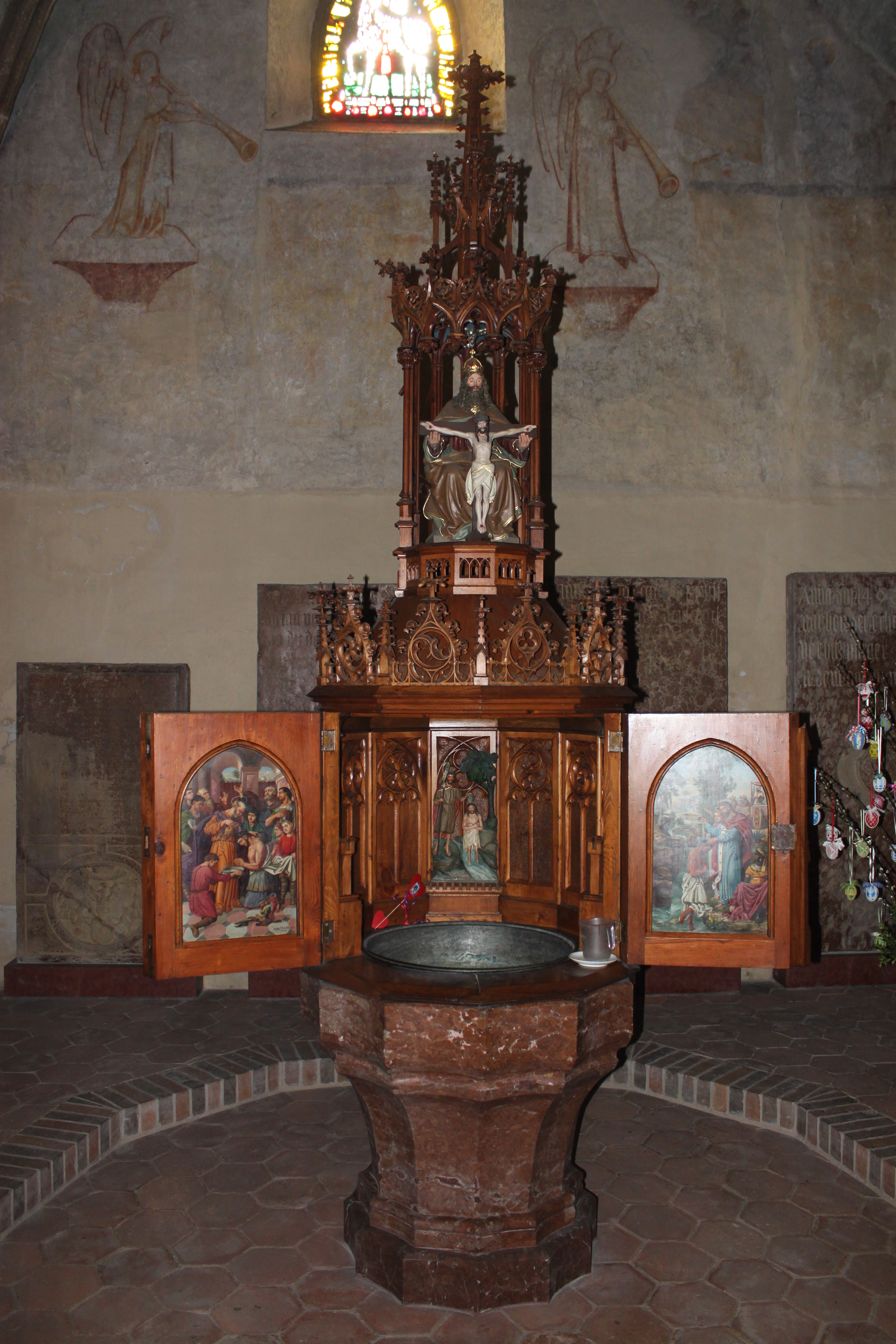 Taufbecken der Pfarrkirche St. Stephan, Amstetten, Niederösterreich, Aufsatz von Josef Kepplinger